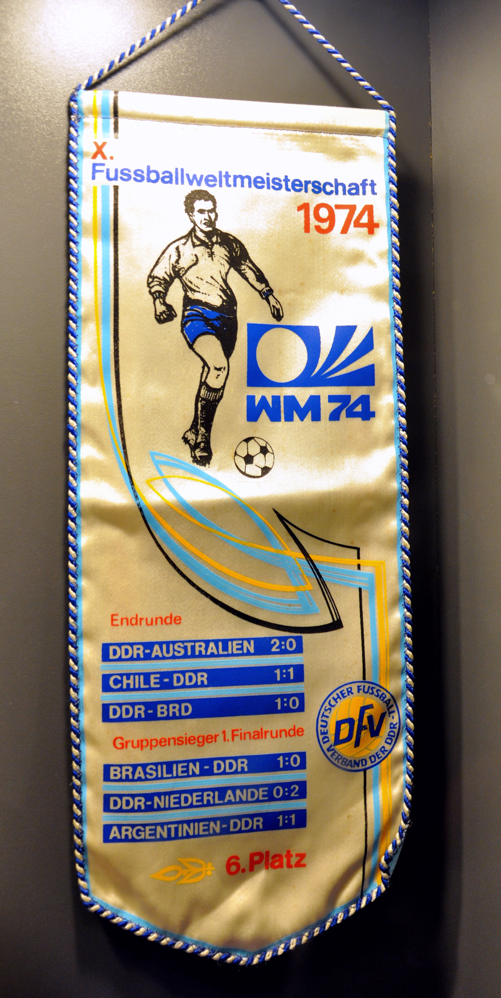 Wimpel zu den Erfolgen der DDR-Mannschaft bei der WM 1974, fotografiert im DDR-Museum Berlin